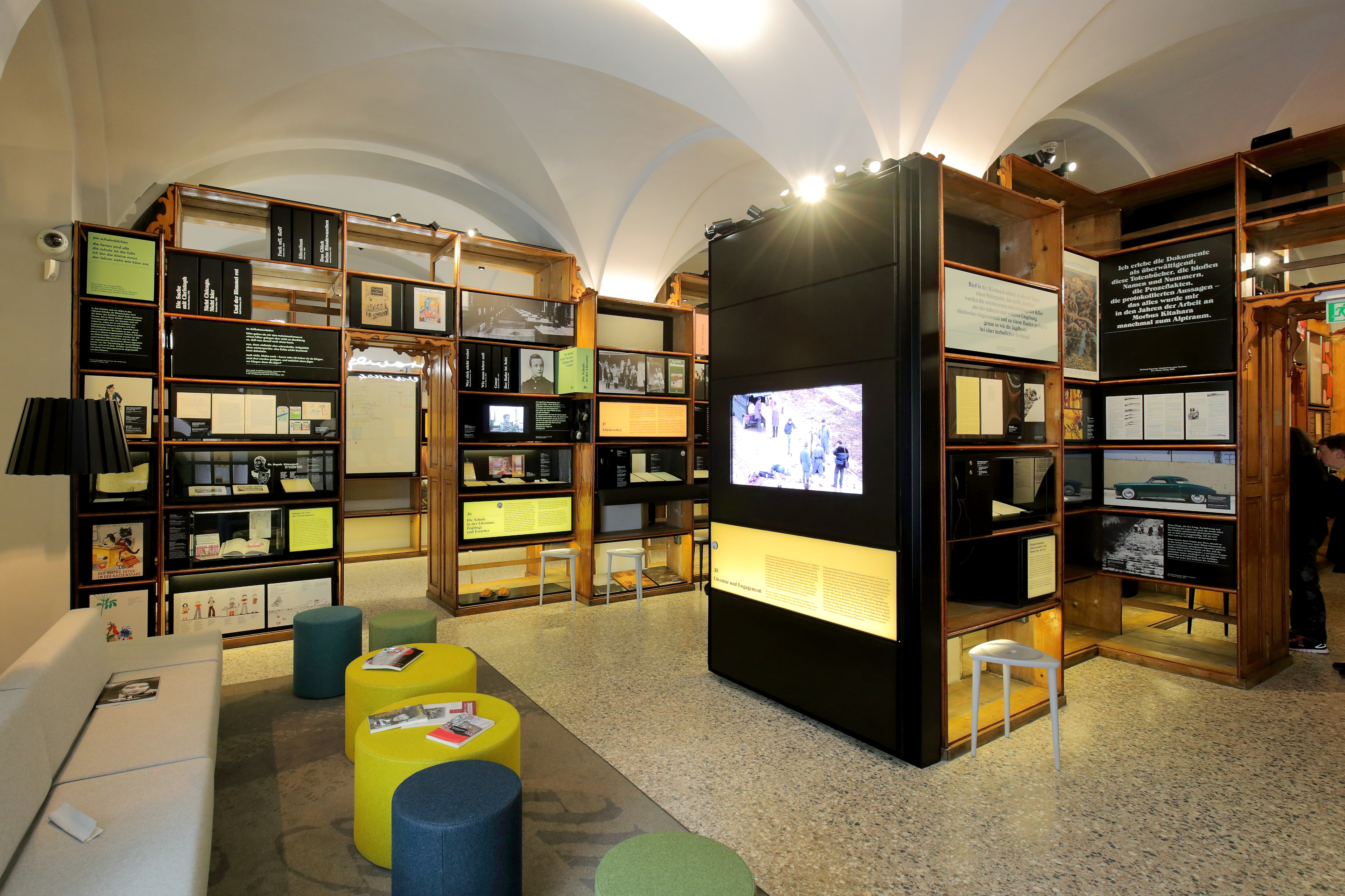 Einer der Schauräume im Literaturmuseum der Österreichischen Nationalbibliothek im 1. Wiener Gemeindebezirk Innere Stadt.Das Literaturmuseum in der Johannesgasse 6 wurde im generalsanierten, ehemaligen k. k. Hofkammerarchiv eingerichtet und am 17. April 2015 eröffnet. In dem denkmalgeschützten Biedermeiergebäude, errichtet in den 1840er Jahren und auch als "Grillparzerhaus" bezeichnet, werden auf rund 750m² rund 650 Exponate von mehr als 200 Autor gezeigt.